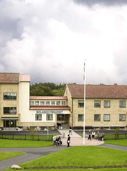 Bolandgymnasiet Uppsala